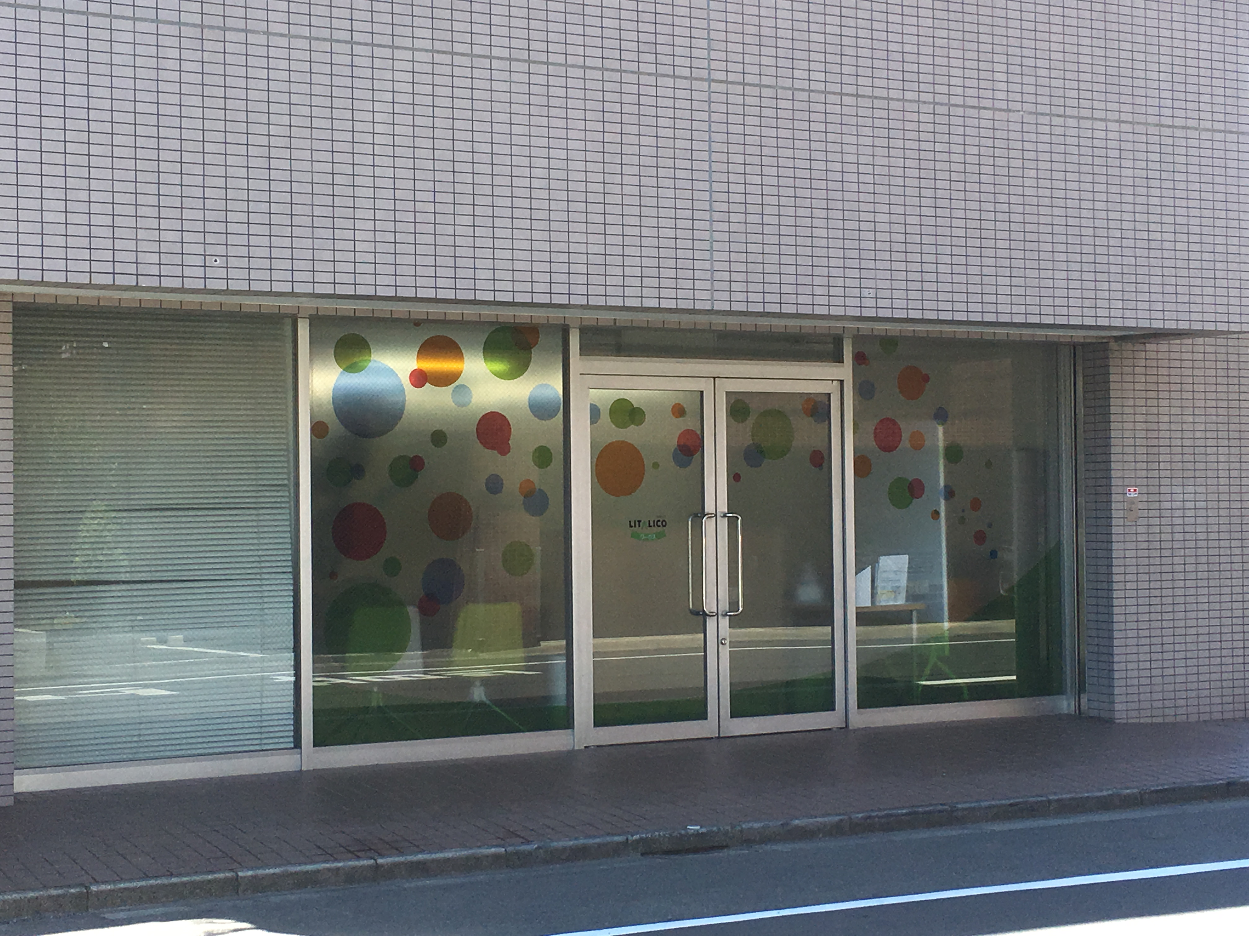 埼玉県所沢市の複合ビル・MOA5の1Fに所在する、就労移行支援事業所「LITALICOワークス所沢」の外観。西武新宿線航空公園駅が最寄り駅。